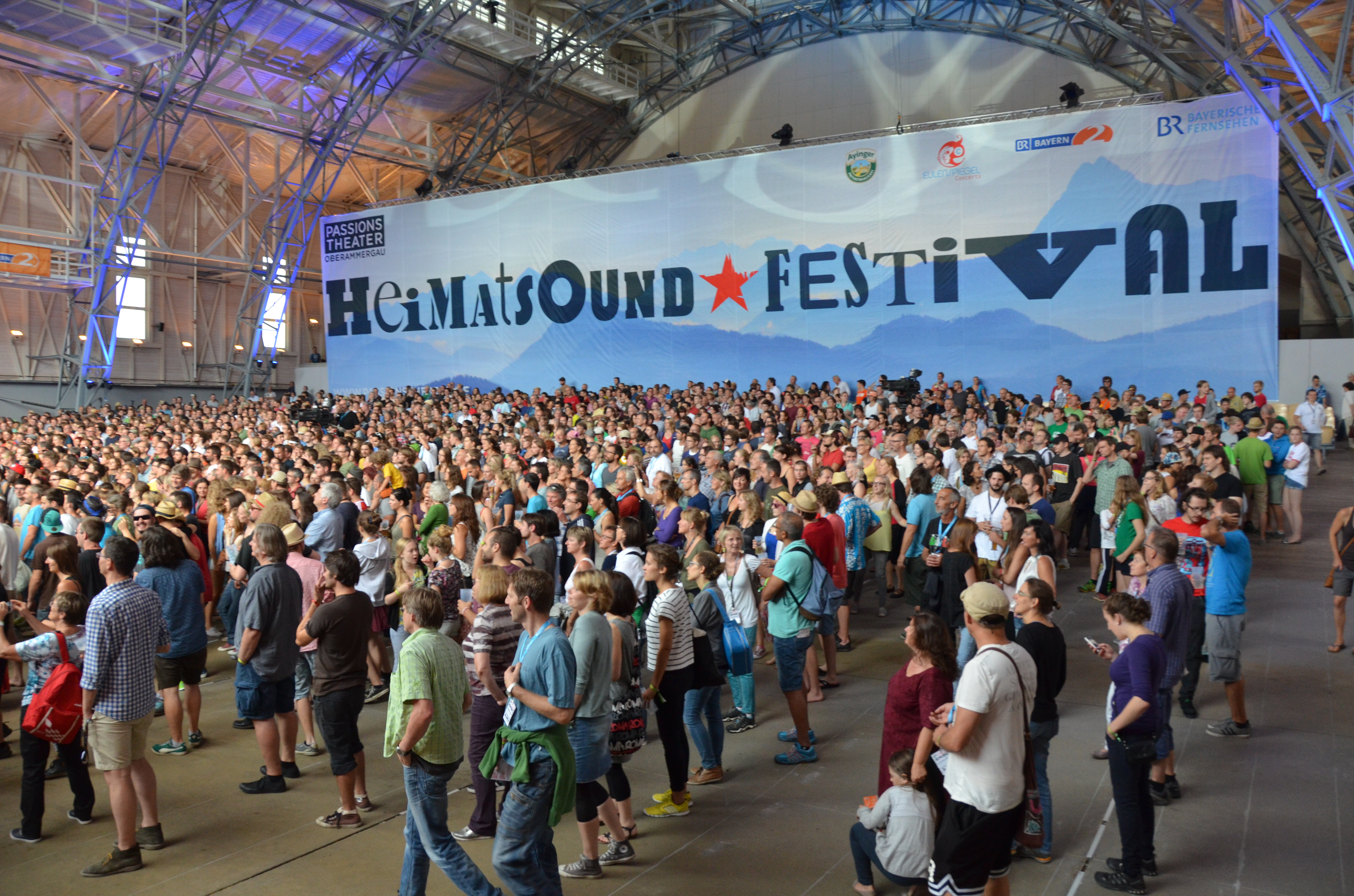 Heimatsound-Festival 2014 in Oberammergau